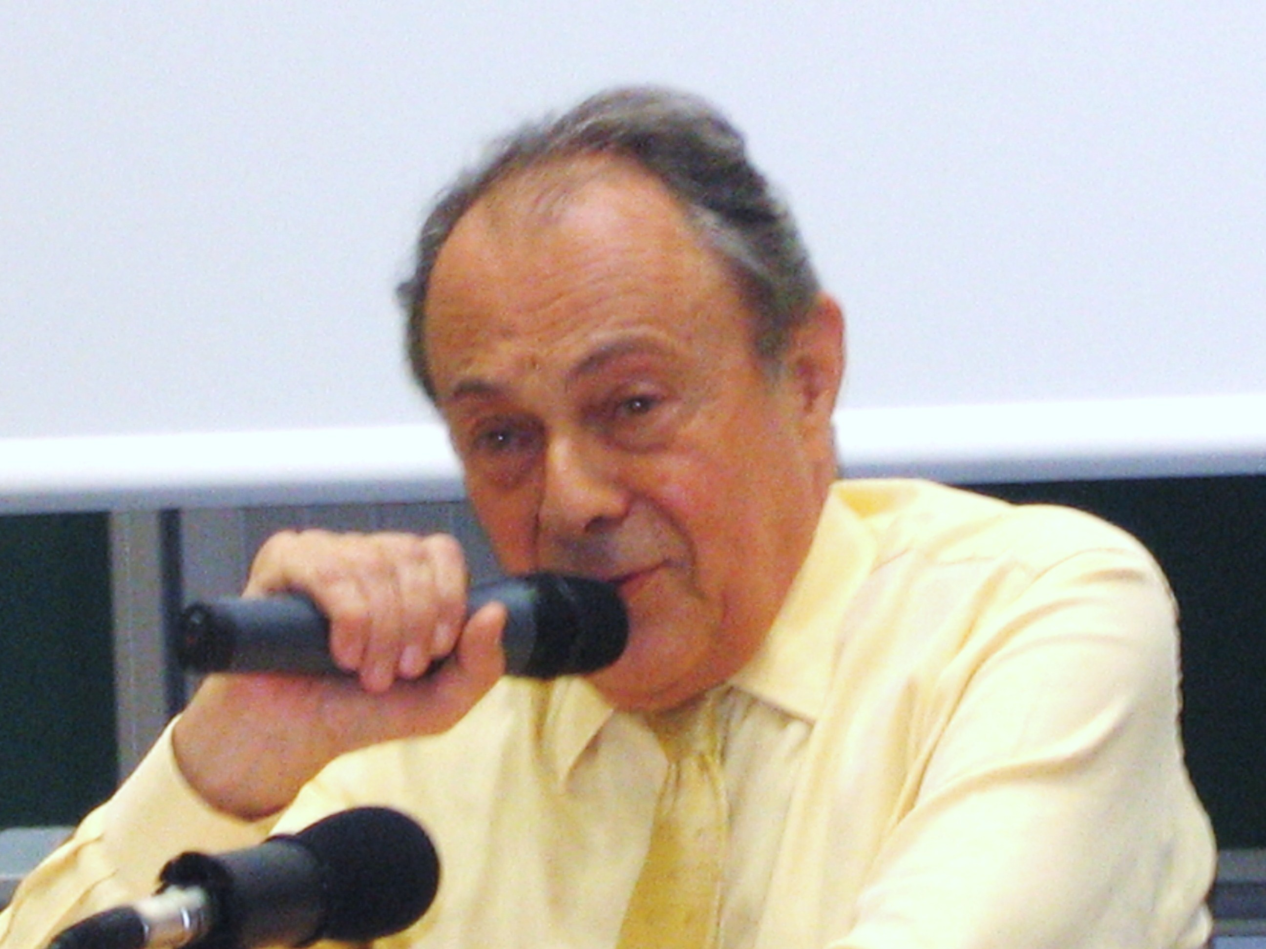 Michel Rocard at RMLL 2006, Vandoeuvre-les-Nancy, France